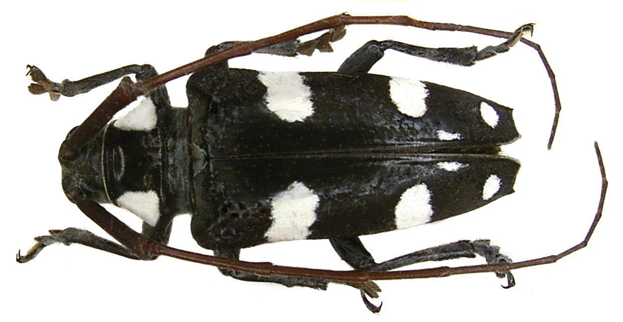 Familie: Cerambycidae Grösse: 23 mm Fundort: Philippinen, Leyte, Hinuangan leg. Medicielo, 1997; det. A.Weigel Foto: U.Schmidt, 2006